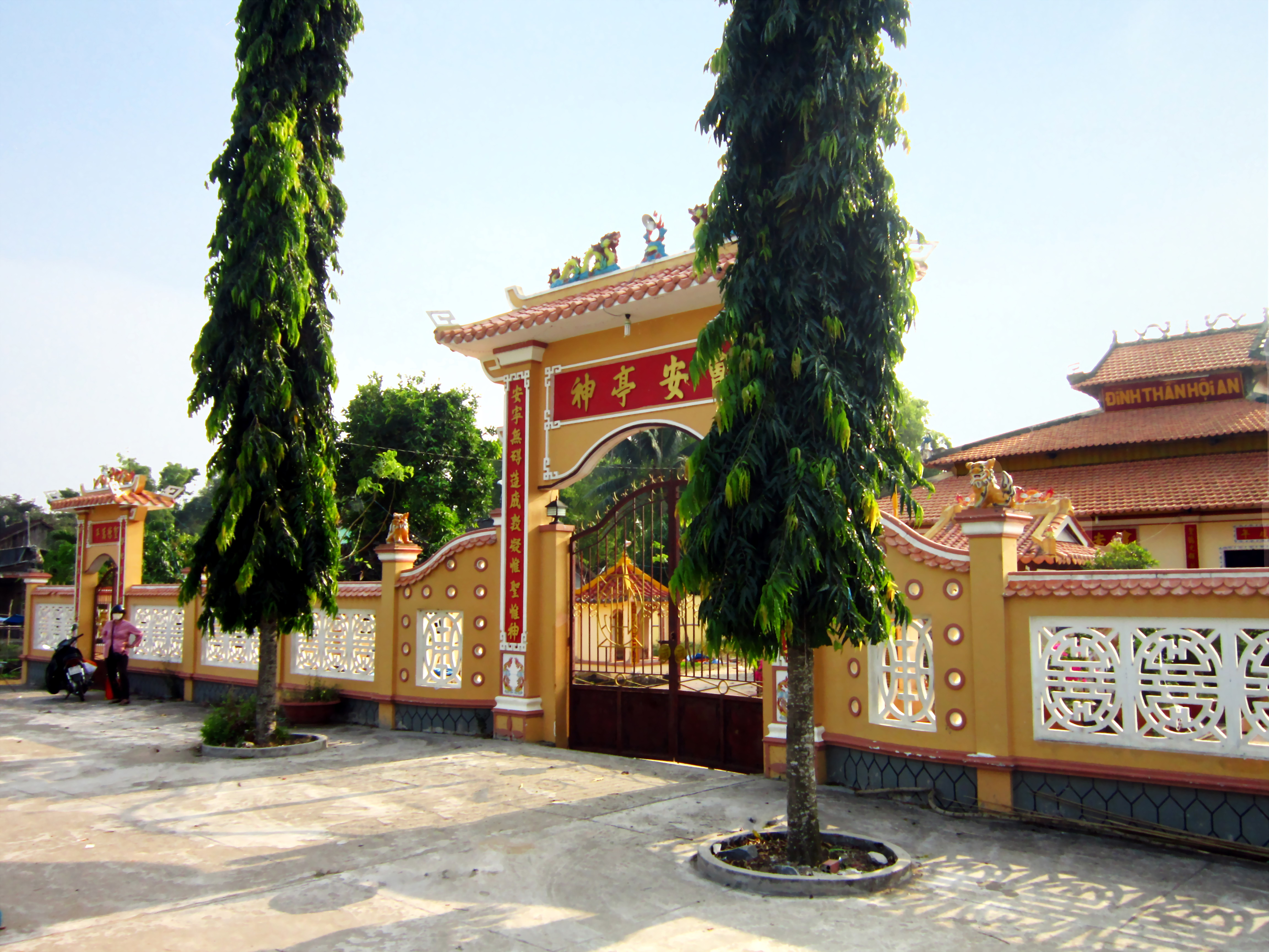 Đình thần Hội An ở Chợ Mới, tỉnh An Giang, Việt Nam. Đây là một ngôi đình cổ, được khởi công trùng tu vào ngày rằm tháng 10 năm Bính Tuất (2006), và hoàn thành vào ngày 16 tháng 6 năm Đinh Hợi (2007).